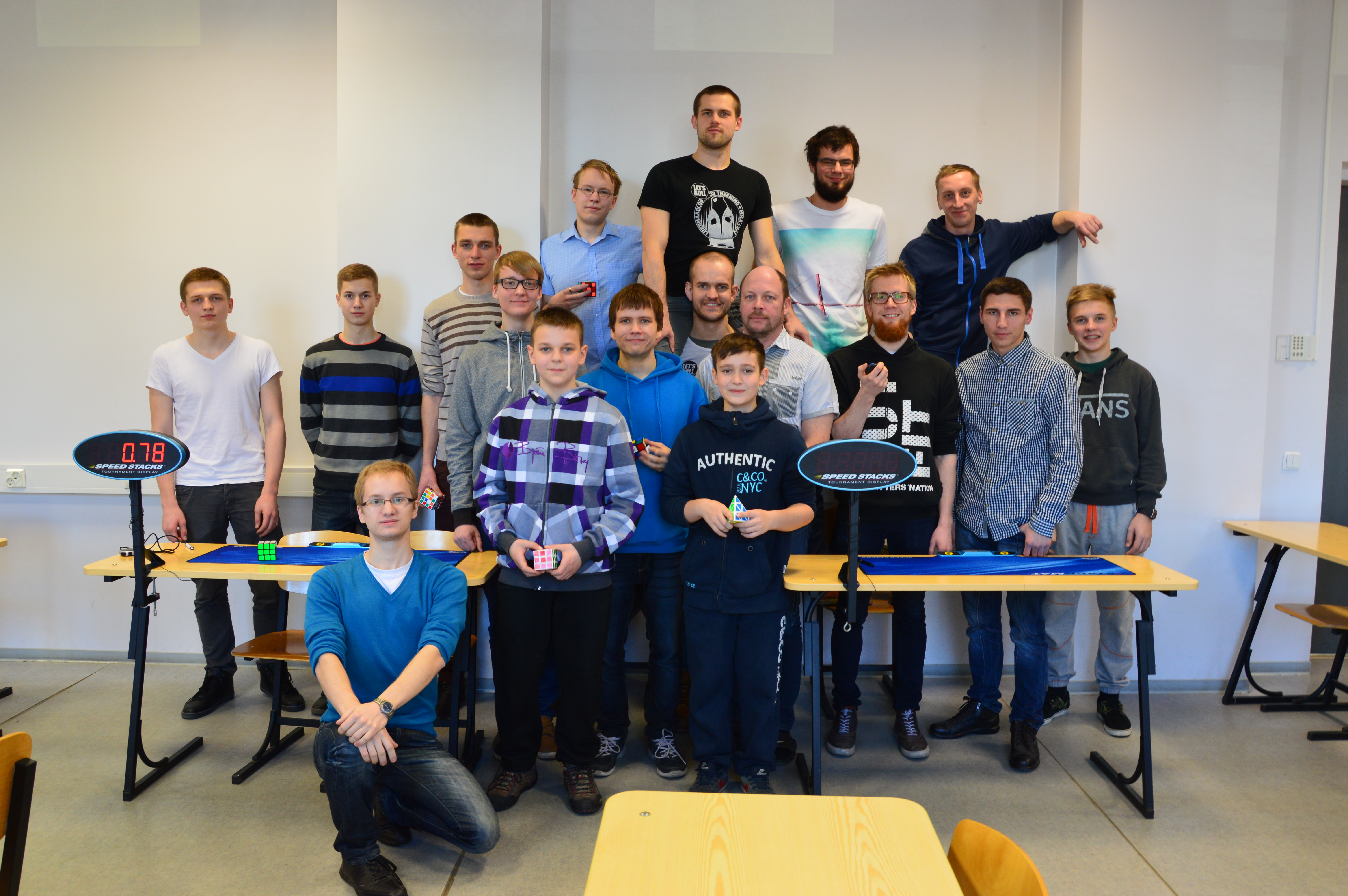 Tallinn Open 2015 võistlusest osavõtjad.